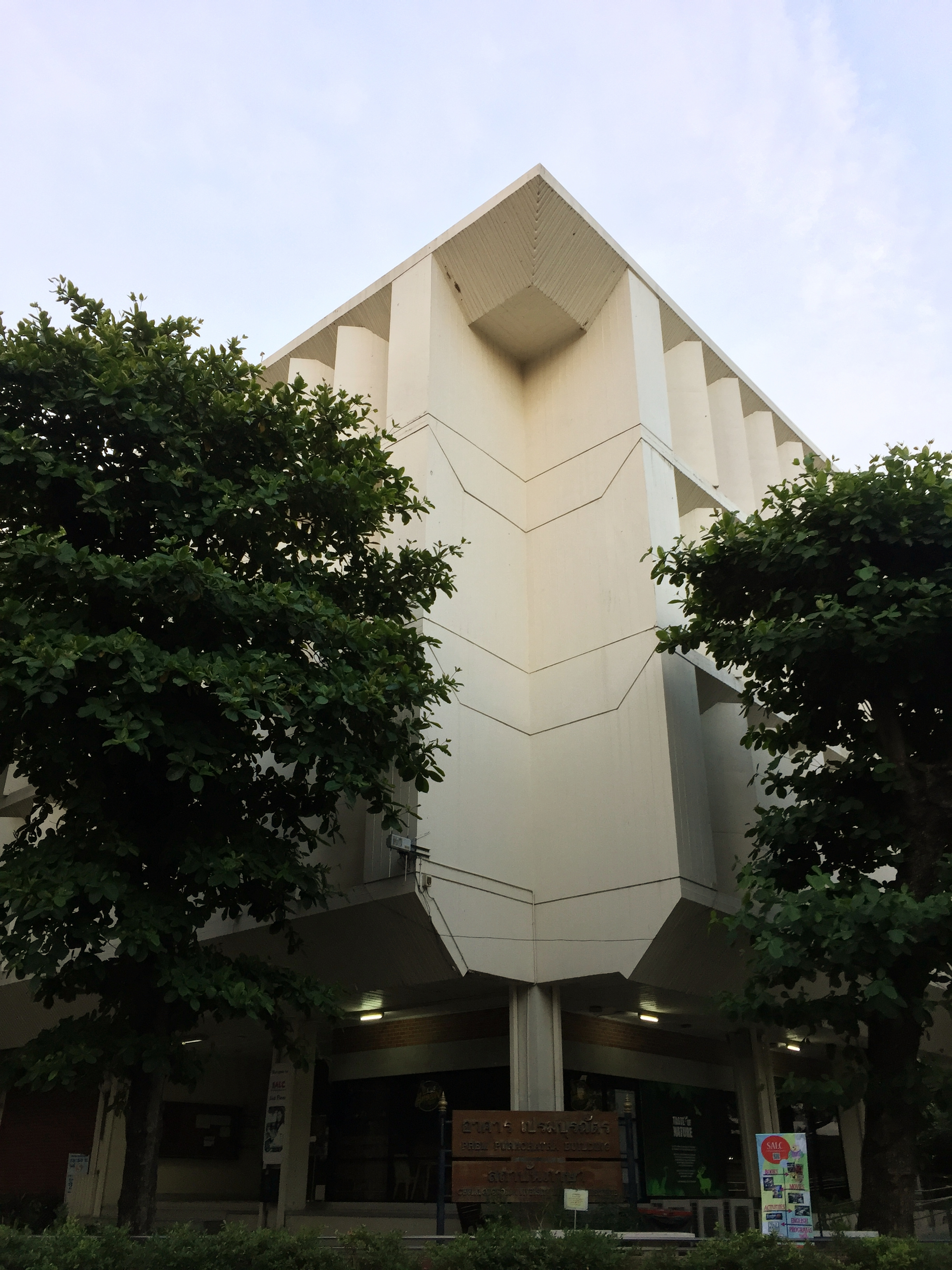 อาคารเปรมบุรฉัตร ที่ตั้งของสถาบันภาษา จุฬาลงกรณ์มหาวิทยาลัย